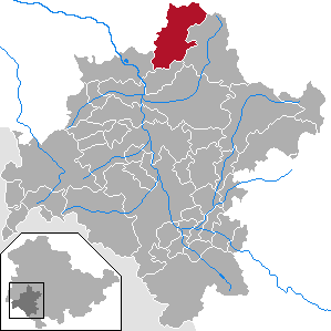 Brotterode-Trusetal in Thuringia - District Schmalkalden-Meiningen